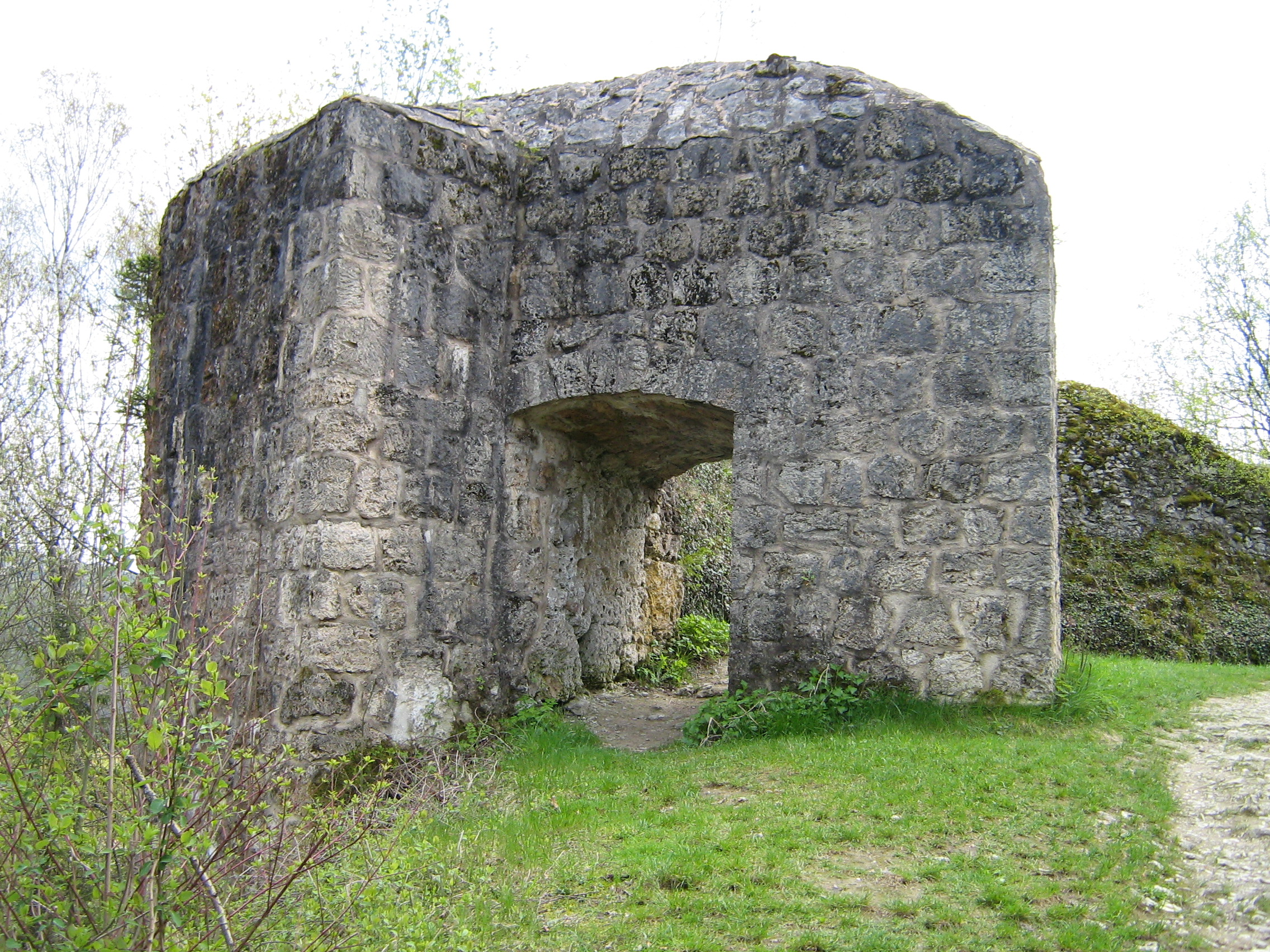 Mauerreste der Burgruine Streitburg in Streitberg